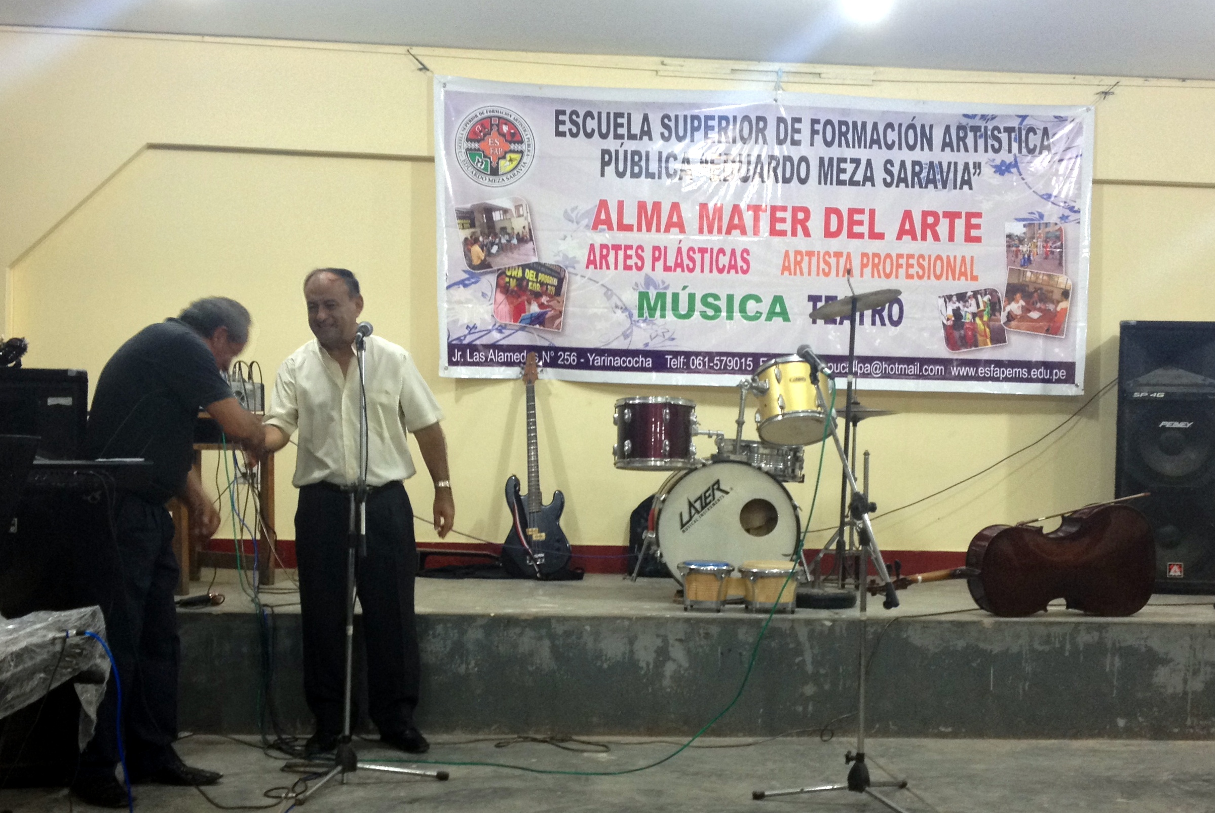 Edwin Vasquez Lopez en una visita de bienvenida en Eduardo Mesa Saravia.